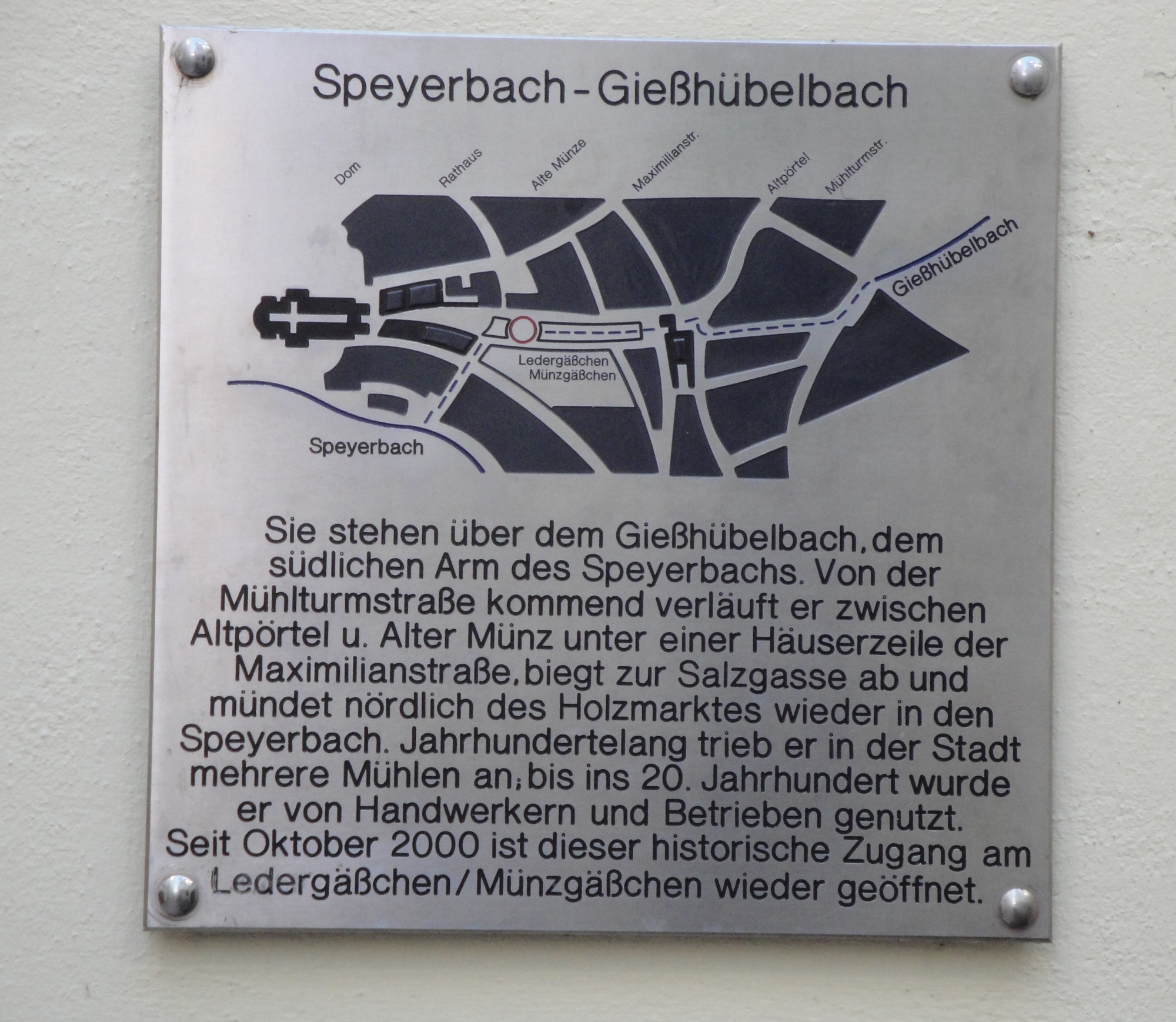 Verlauf des Speyerbachs - Gießhübelbachs